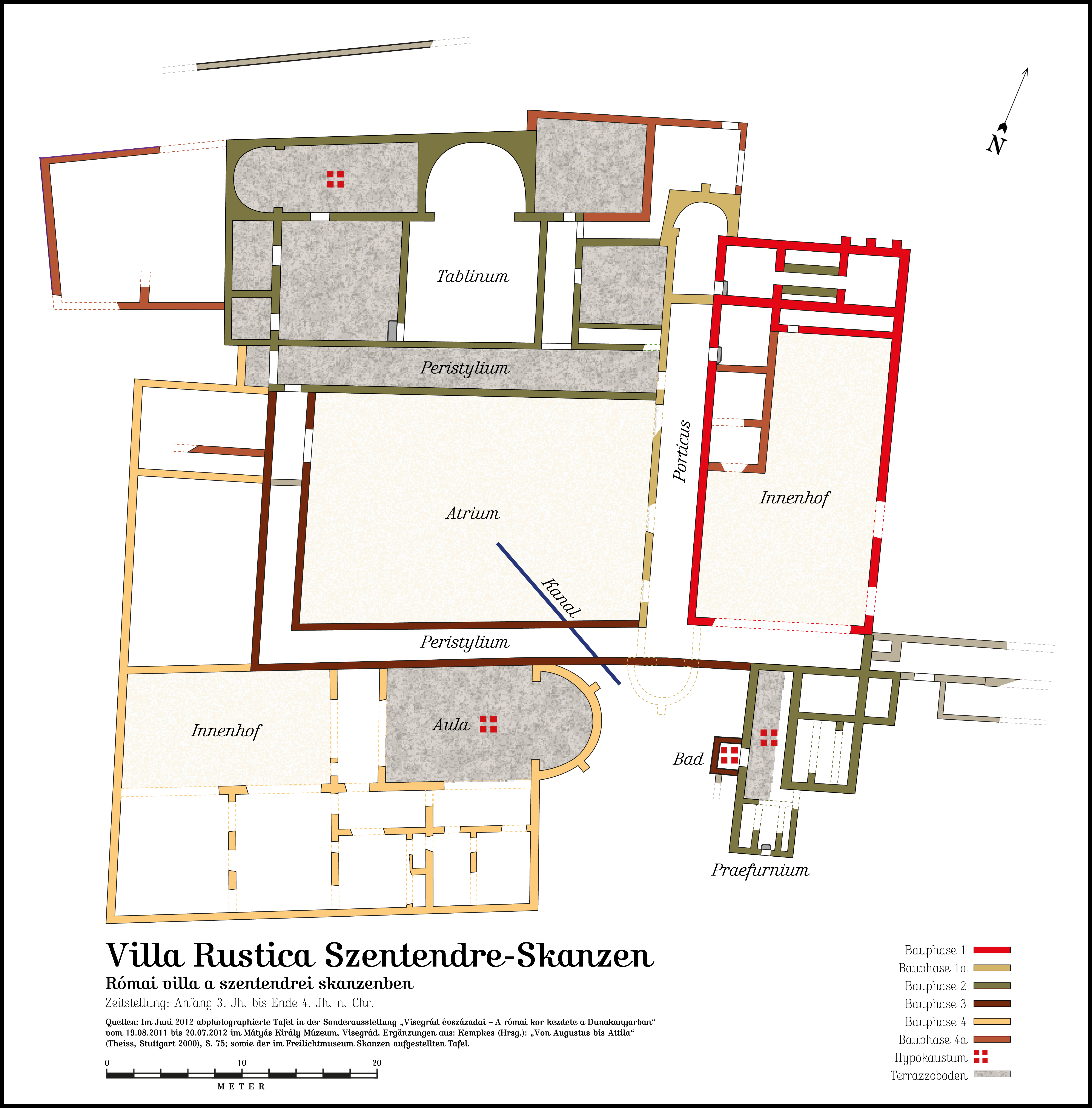 Die Villa Rustica im Freilichtmuseum Skanzen bei Szentendre, Ungarn. Quellen: Im Juni 2012 abphotographierte Tafel in der Sonderausstellung „Visegrád évszázadai – A római kor kezdete a Dunakanyarban“ vom 19.08.2011 bis 20.07.2012 im Mátyás Király Múzeum, Visegrád. Ergänzungen aus: Kempkes (Hrsg.): „Von Augustus bis Attila“ (Theiss, Stuttgart 2000), S. 75; sowie der im Freilichtmuseum Skanzen aufgestellen Tafel. Gezeichnet in FreeHand MX für Macintosh; abgespeichert in Adobe Photoshop CS. Dies ist die Originalversion der Zeichnung.